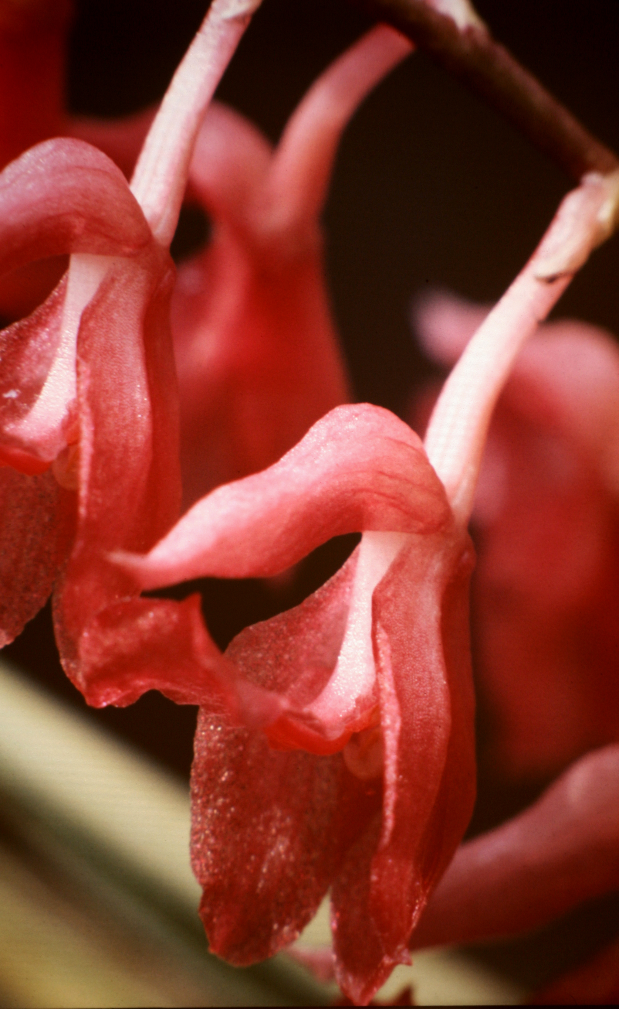 Rodriguezia lanceolata, Suriname. Syn: Rodriguezia secunda